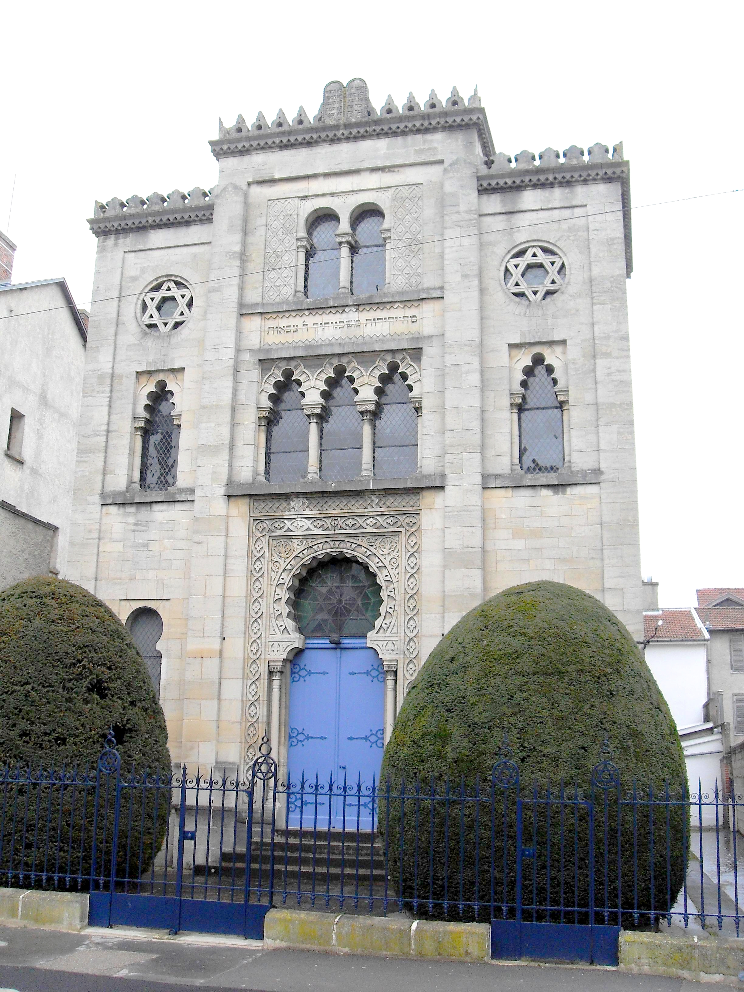 Synagogue de Chalons Marne 51